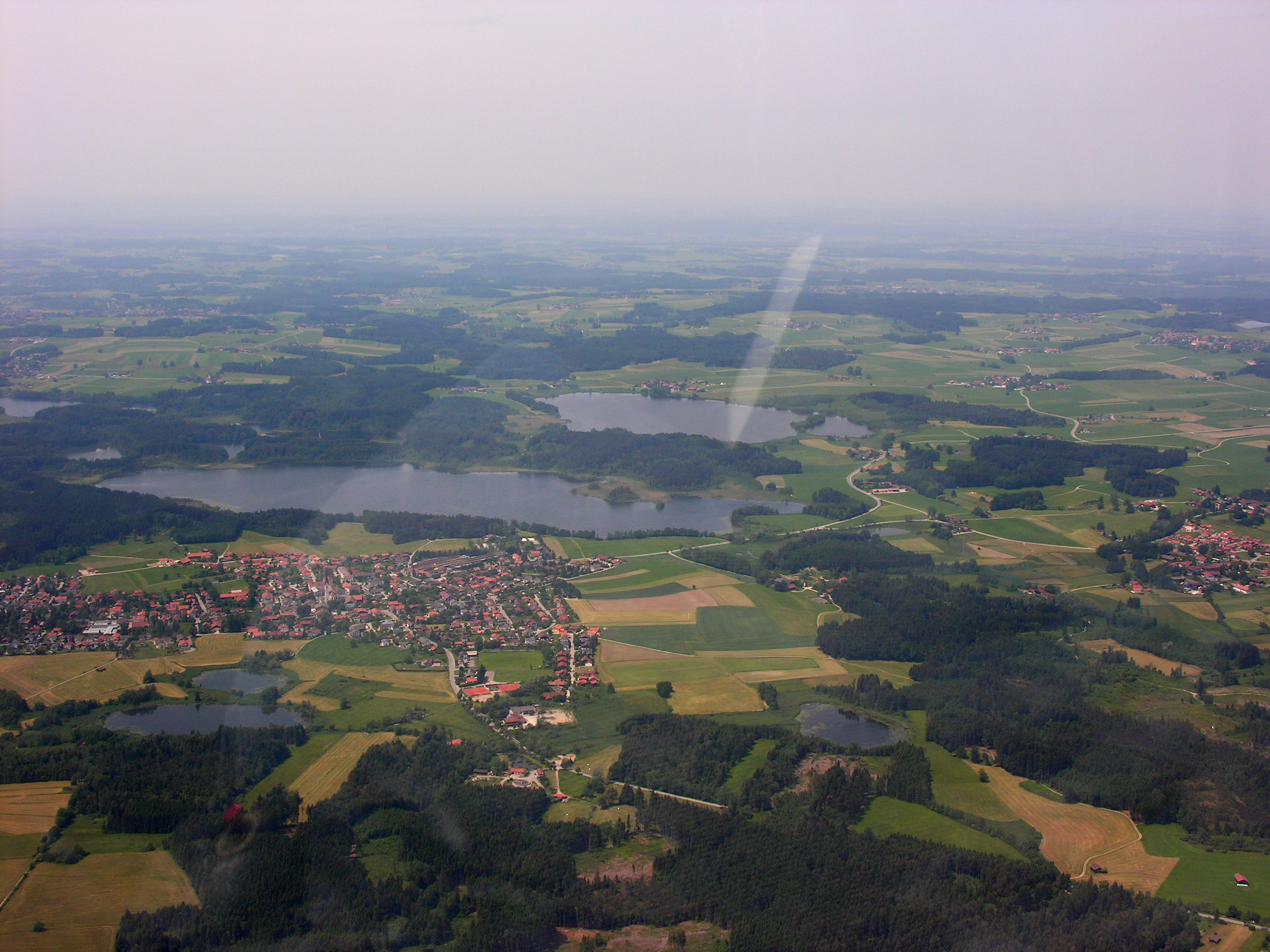 Germany, Bavaria, Eggstätt